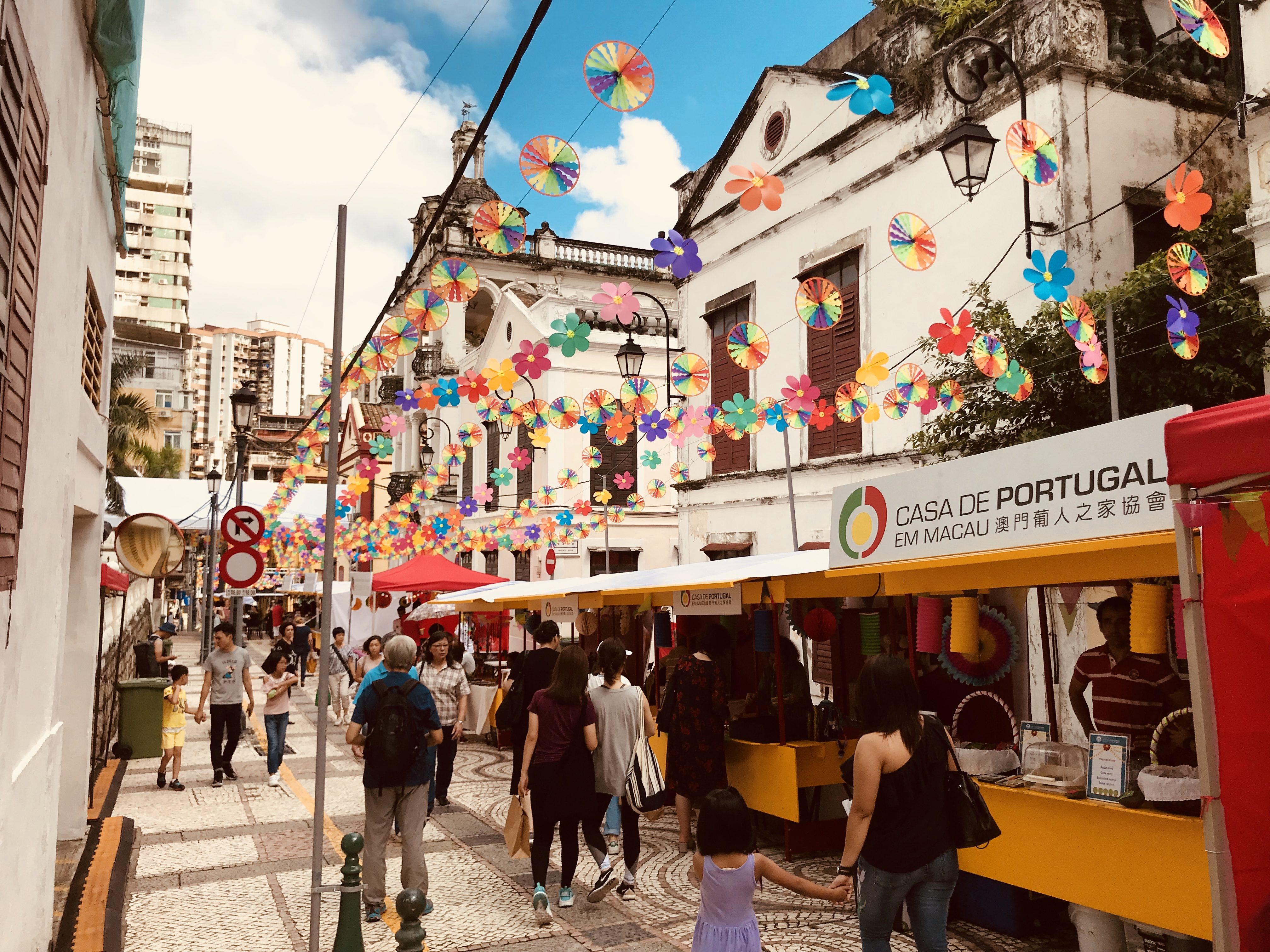 中文（台灣）: 澳門聖若翰節2018